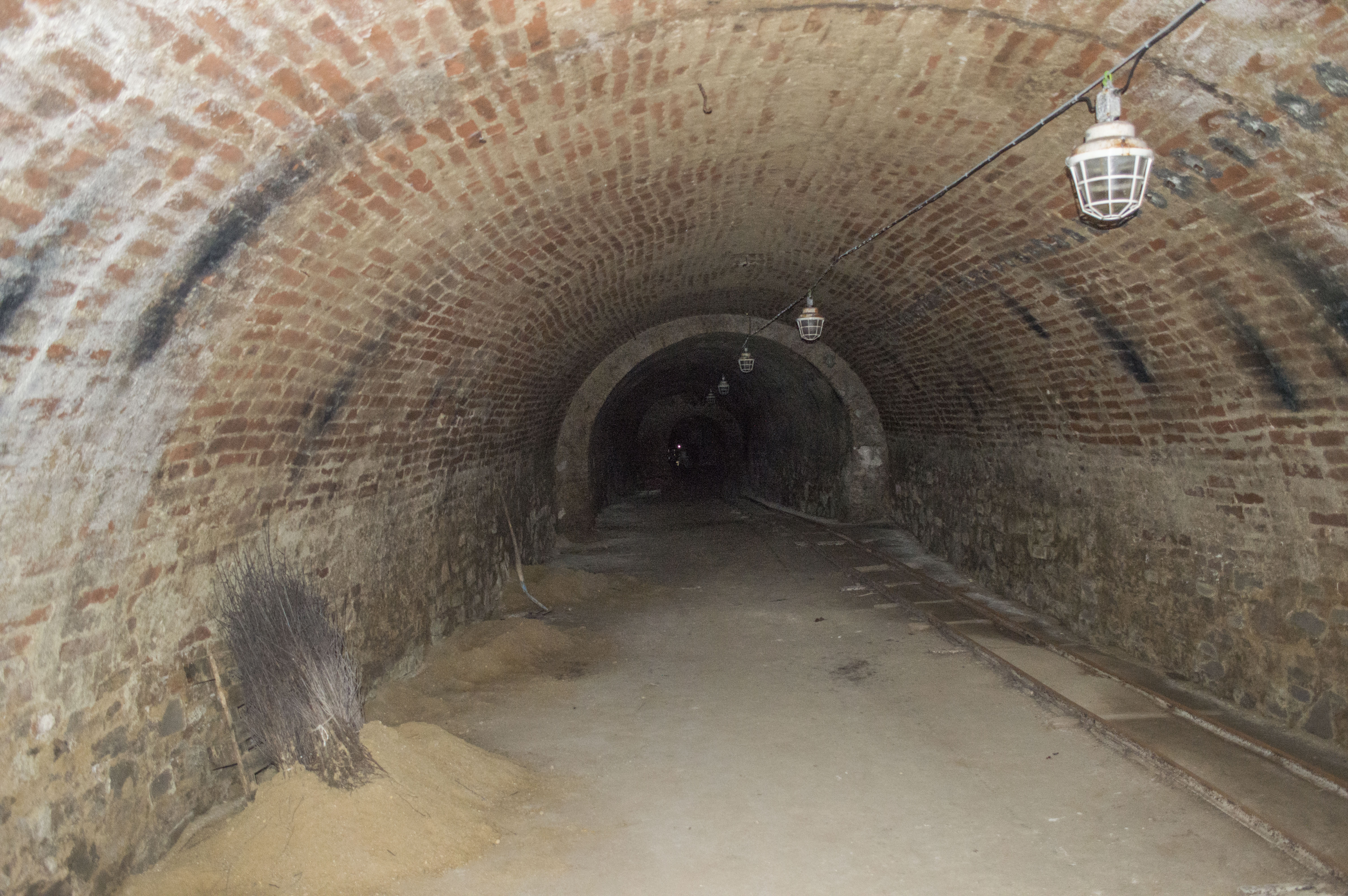 Panský sklep v Miroslavských Knínicích - chodba.